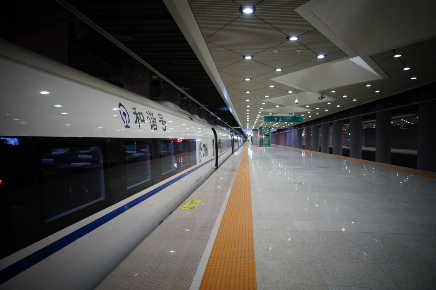 中文（中国大陆）: 于家堡站站台